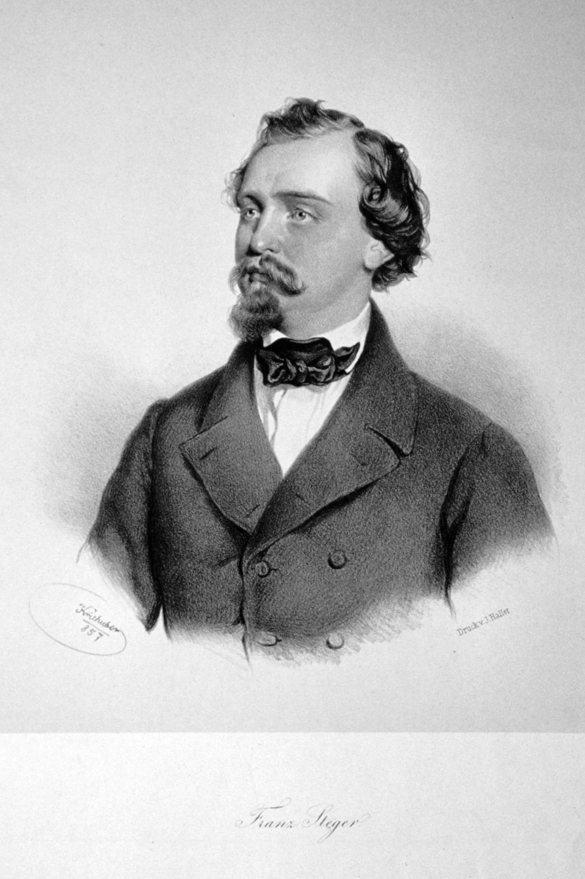 Franz Steger (1824-1914), österreichischer Opernsänger (Tenor) Lithographie von Josef Kriehuber, 1857